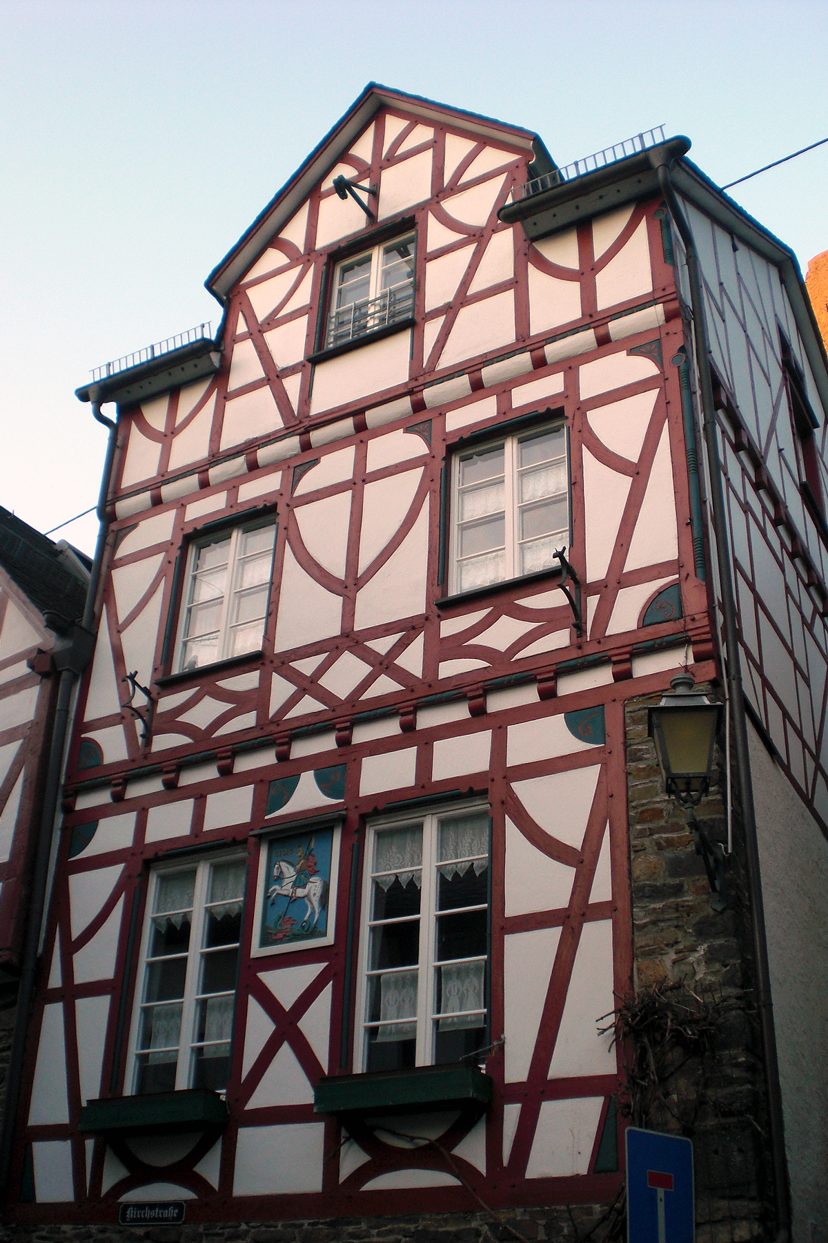 Monreal Eifel - Kirchstraße 2. Prächtiges Fachwerkhaus von 1926 mit einer Darstellung des Hl. Georg